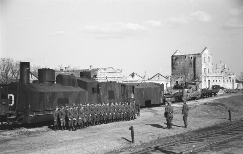 Krim, 1942 Oberstlt. v. Ahlfen besichtigt Panzerzug